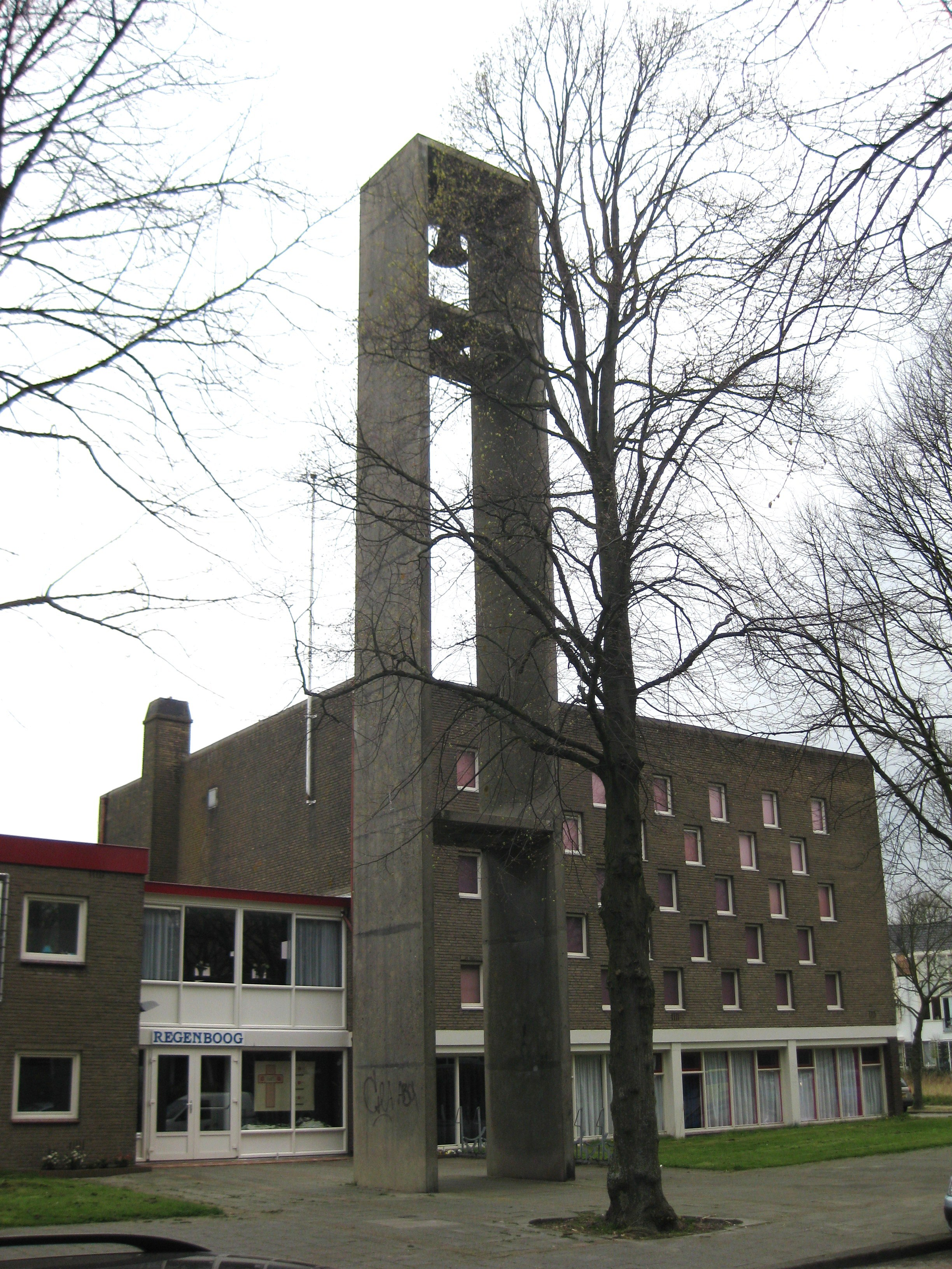 Kometensingel 58, Amsterdam-Noord (Tuindorp Oostzaan)